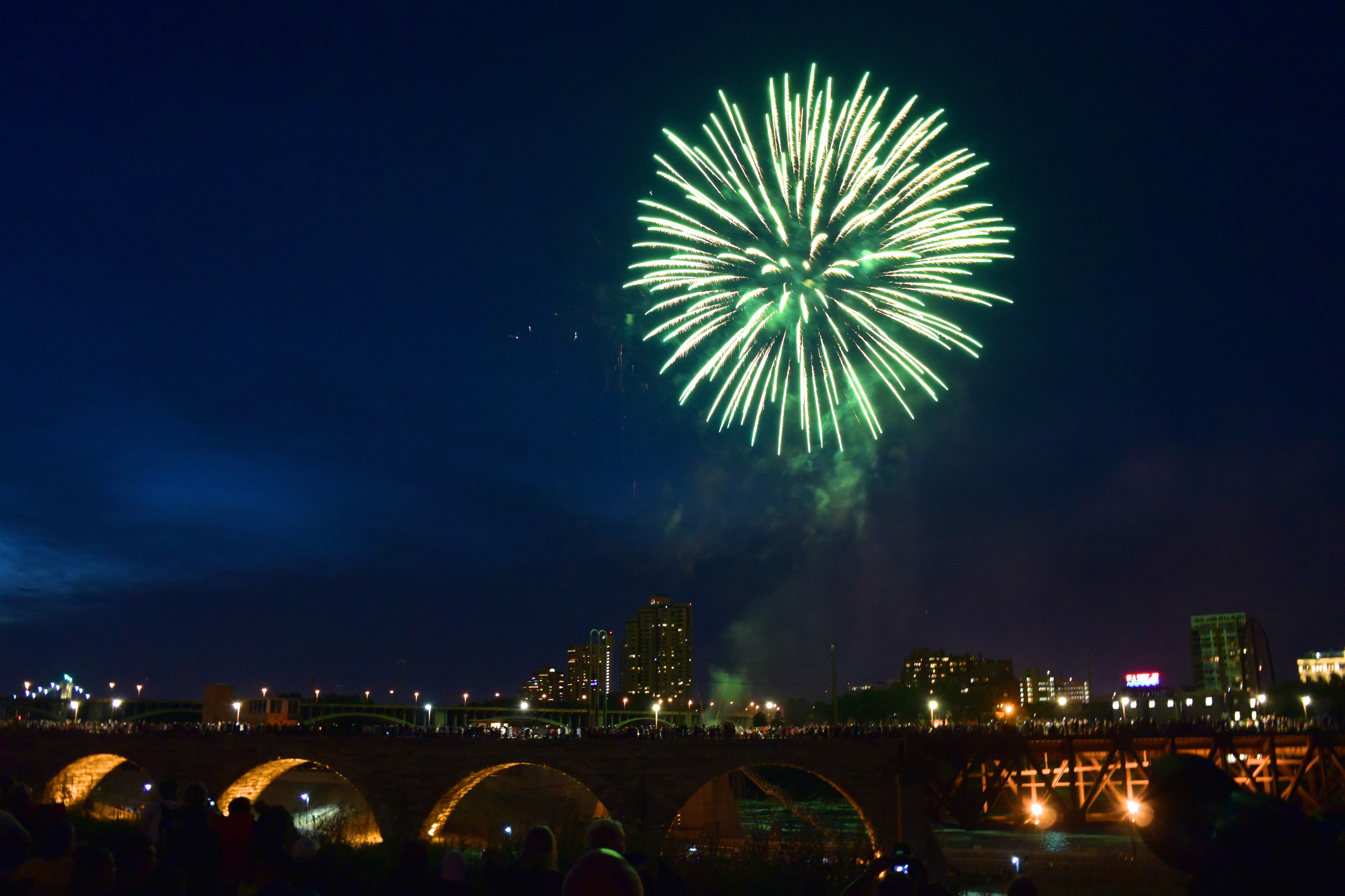 w/ Nikon 1 V3 + 10-30mm